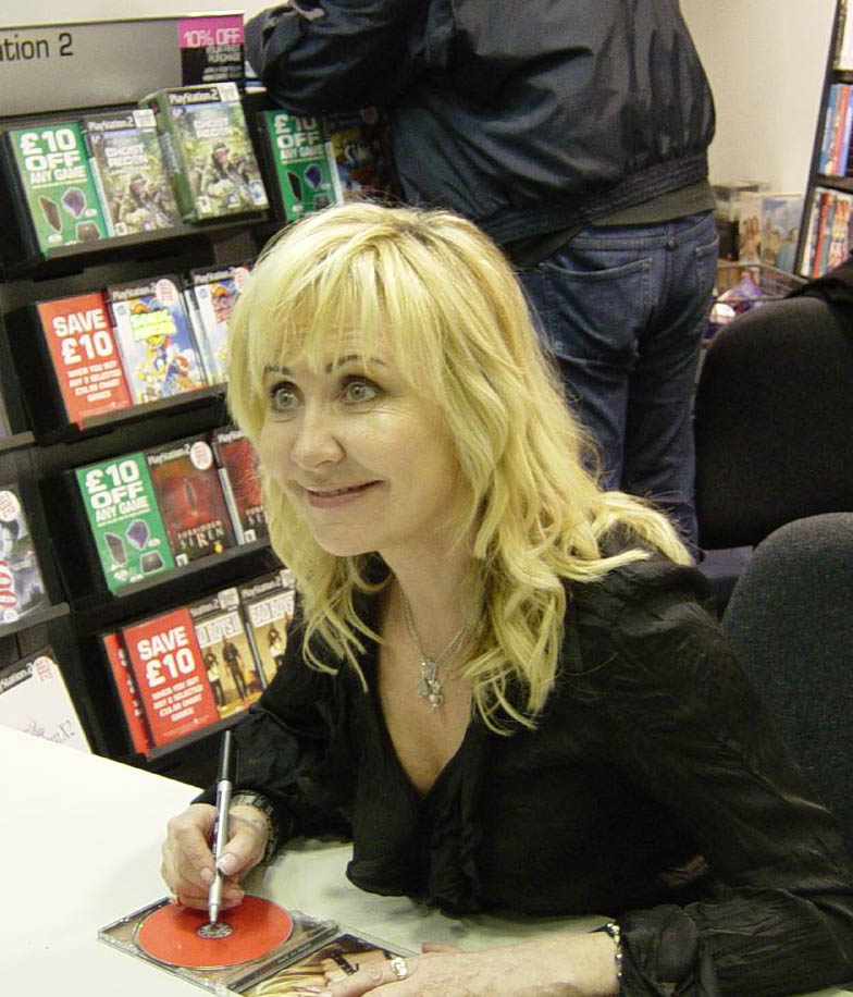 Lulu at booksigning